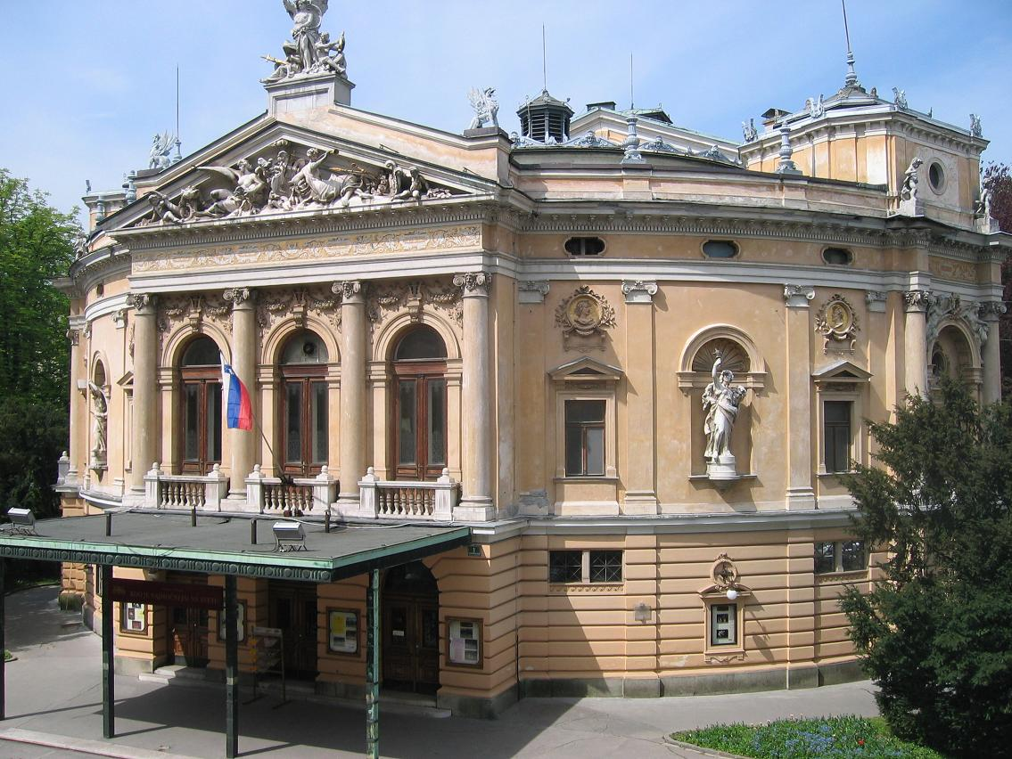 Opera house in Ljubljana photo:Ziga 10:08, 27 April 2006 (UTC)